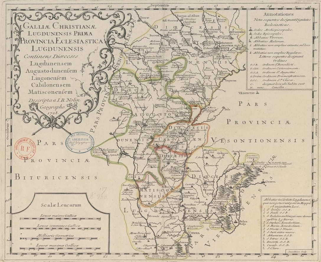 Carte de l'ancienne province ecclésiastique de Lyon, insérée dans la Gallia Christiana (1715/1759).